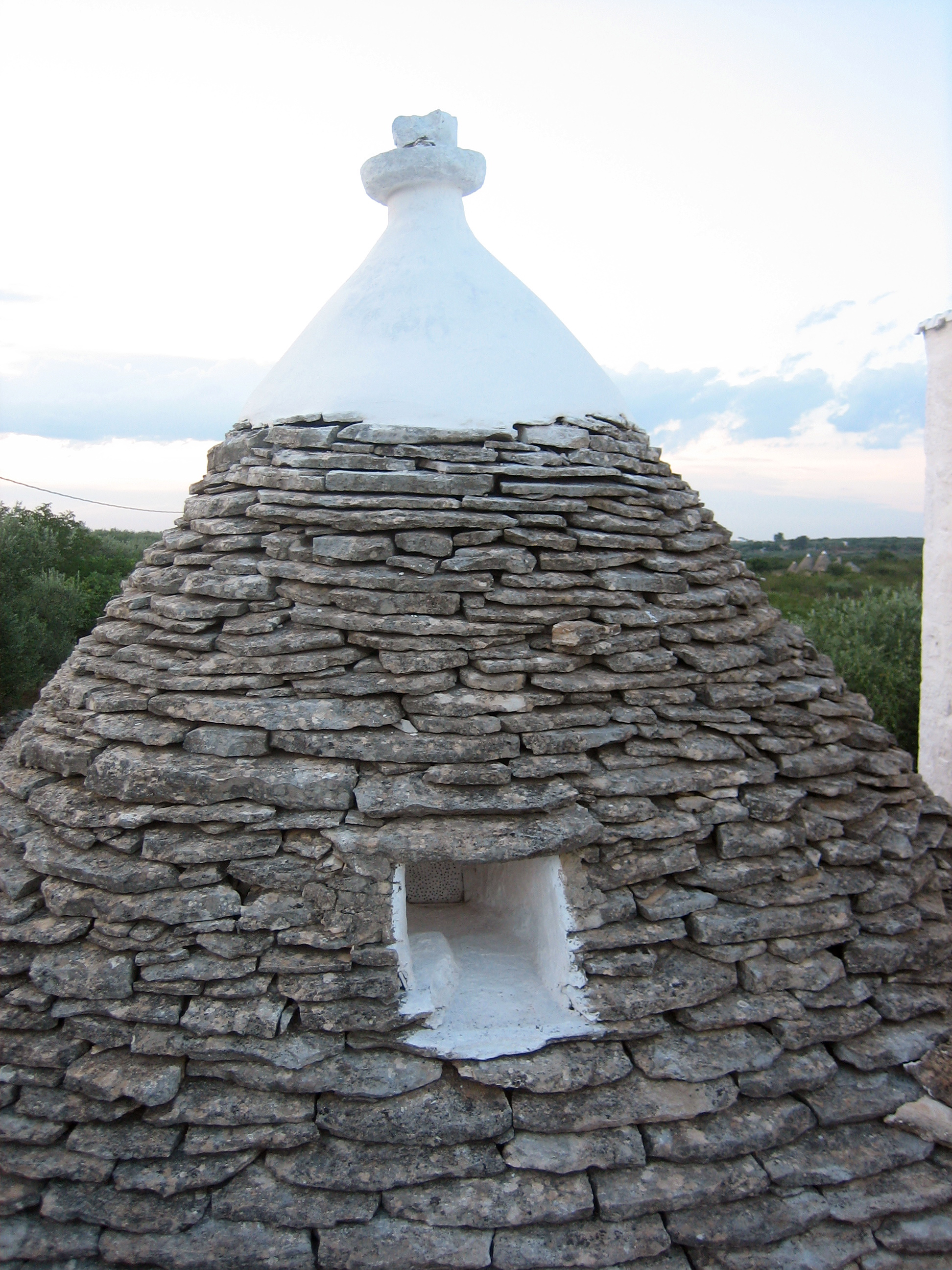 Trullo